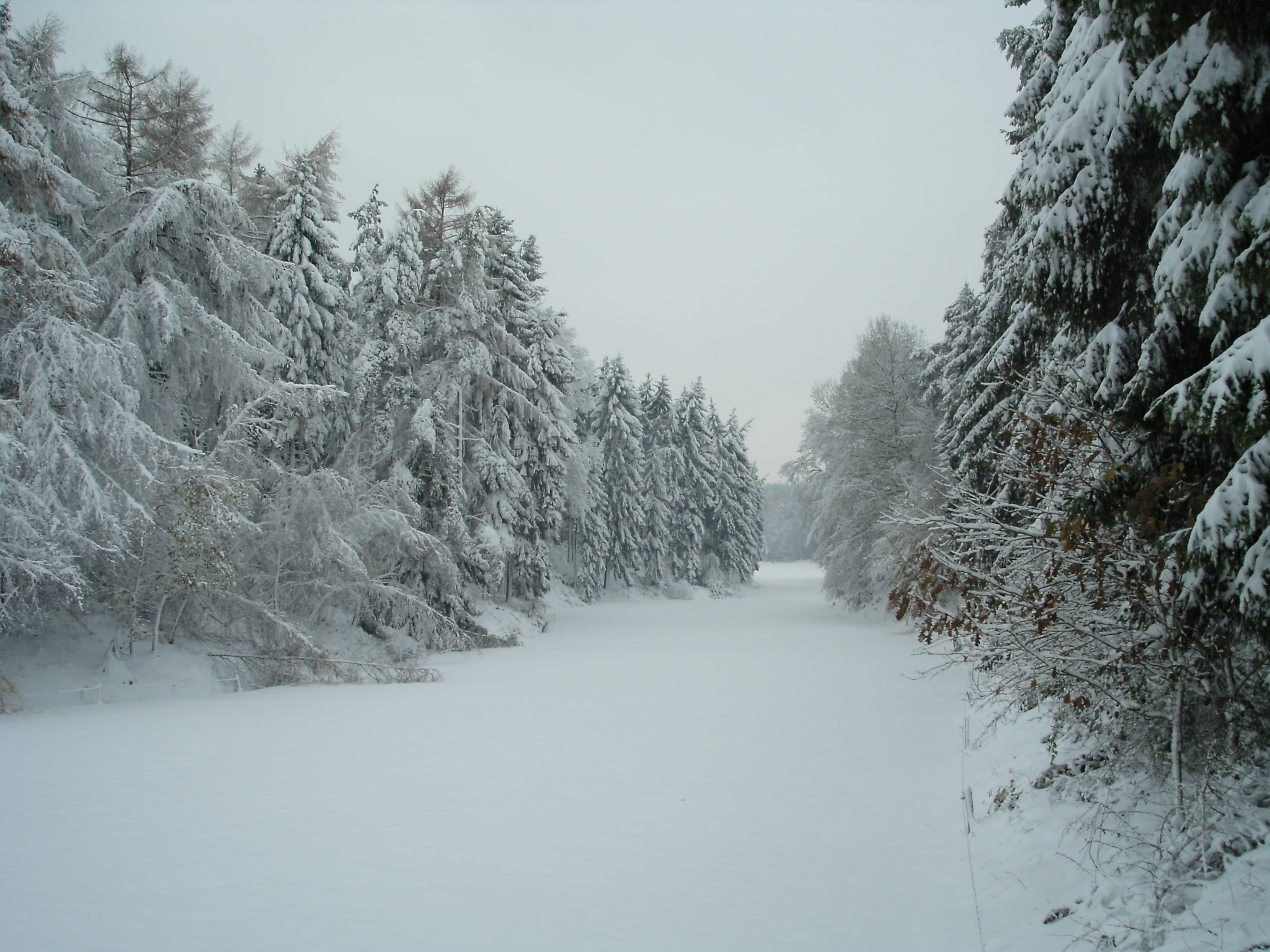 Ein Berg im Helmkämper Ort